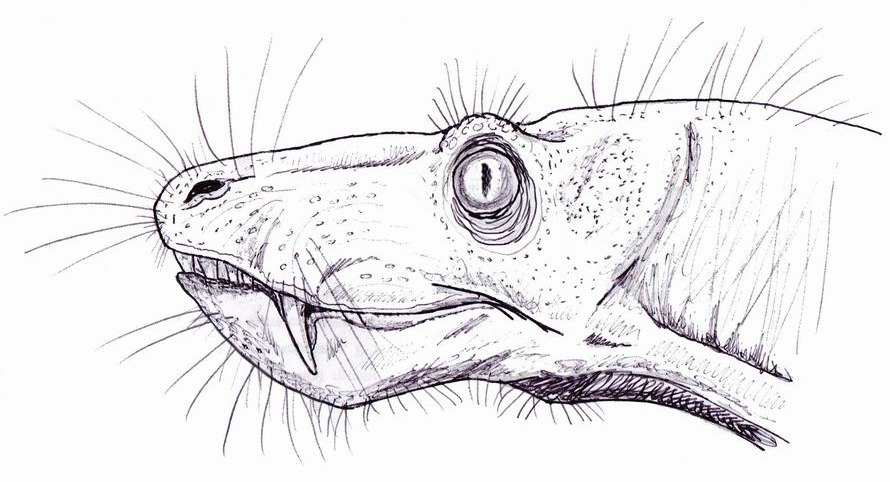 Aelurosaurus